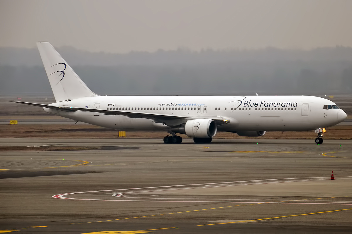 Blue Panorama, EI-FCV, Boeing 767-3X2 ER